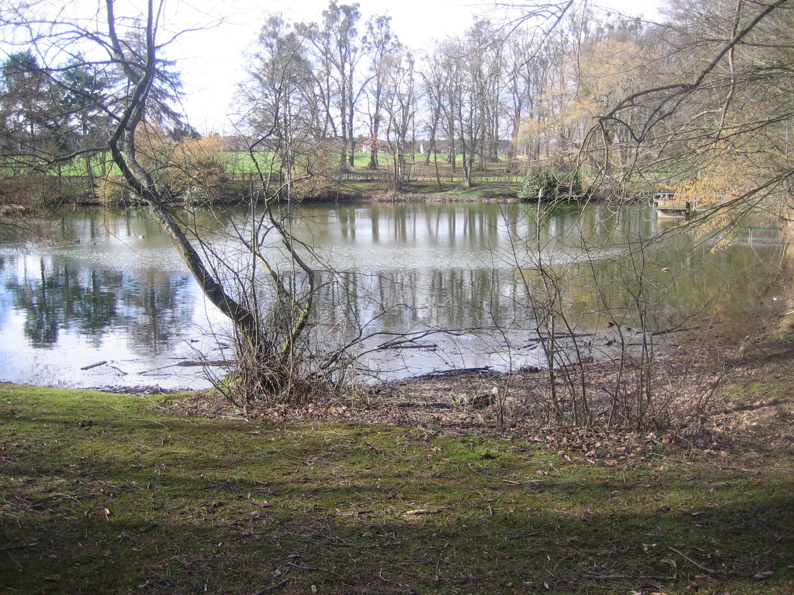 Schlosteich Schloss Arolsen in Hessen